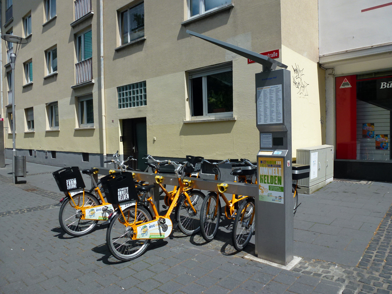 MVGmeinRad-Station in Mainz, hier am Kronberger Hof